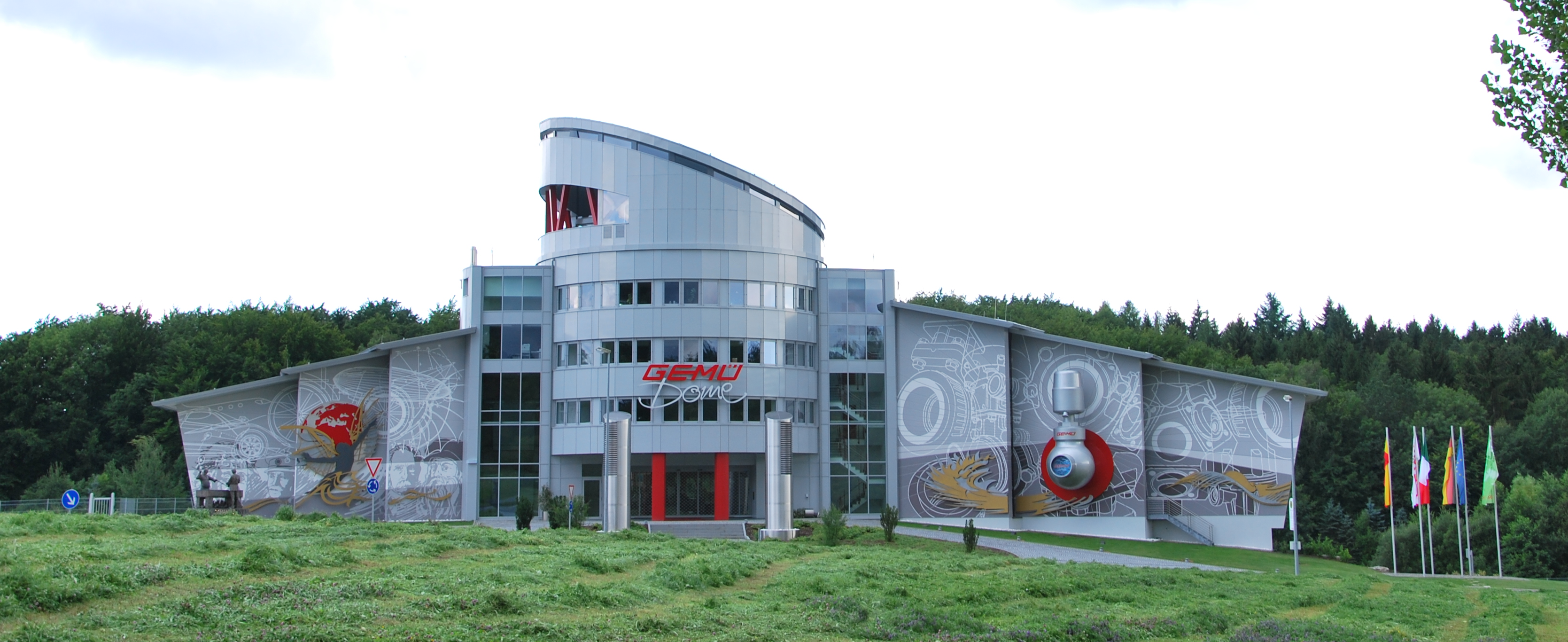 Der GEMÜ Dome in Waldzimmern wurde von der Firma GEMÜ 2009 als „Forschungs-, Entwicklungs und Innovationszentrum“ errichtet.